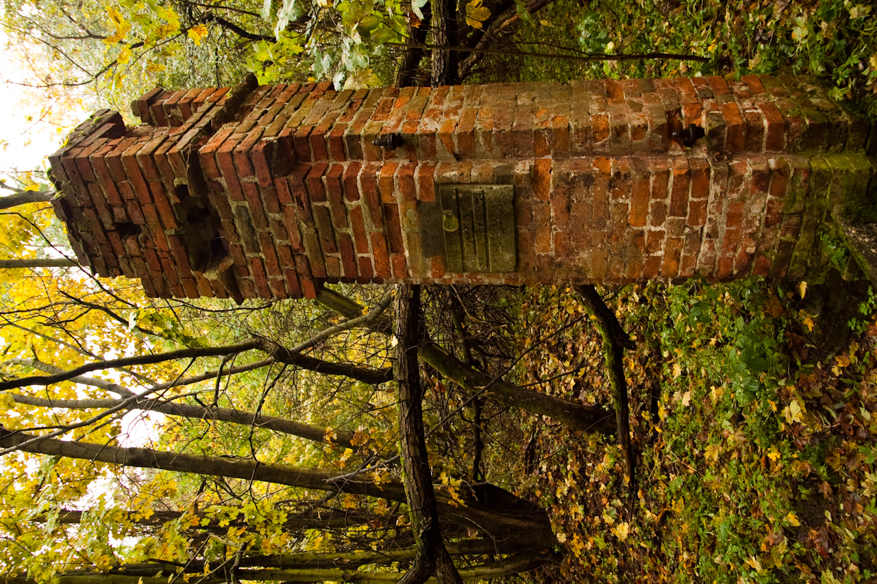 Brama do ruin Szaniawskich